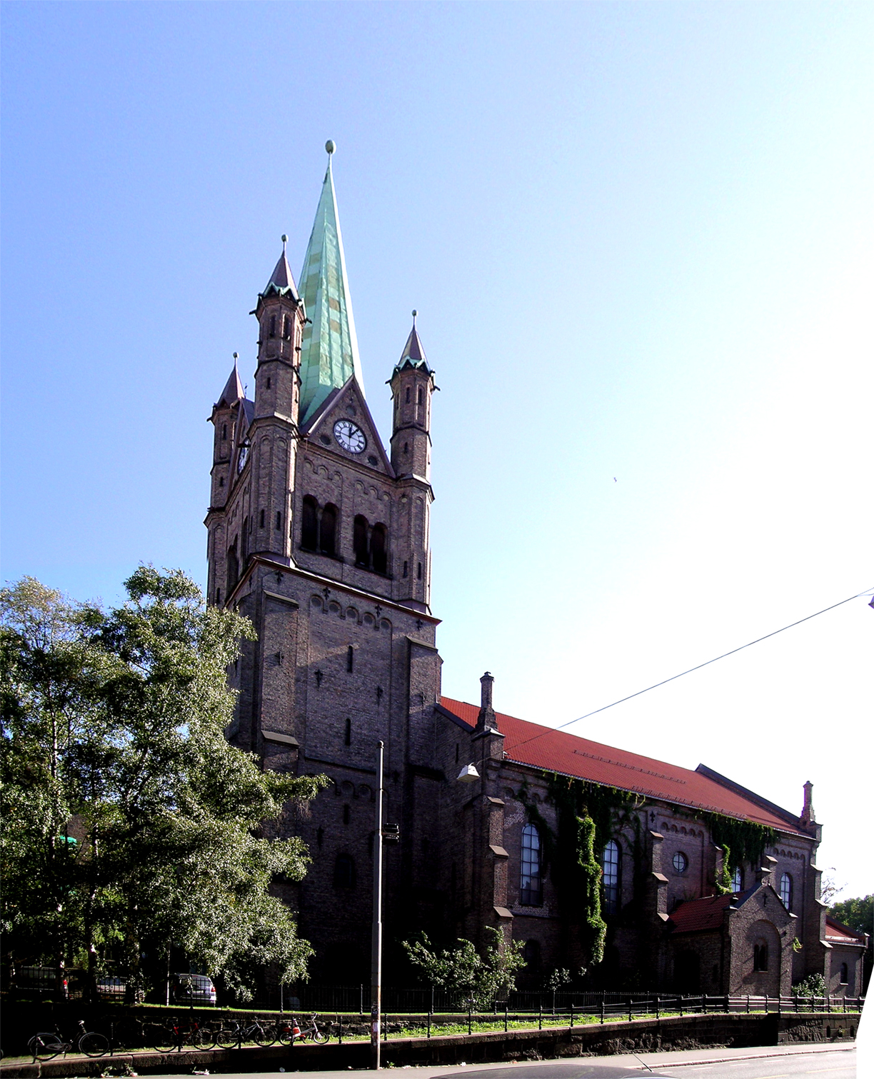 Grønland kirke, Oslo. Erected 1866-1868. Architect: Wilhelm von Hanno.